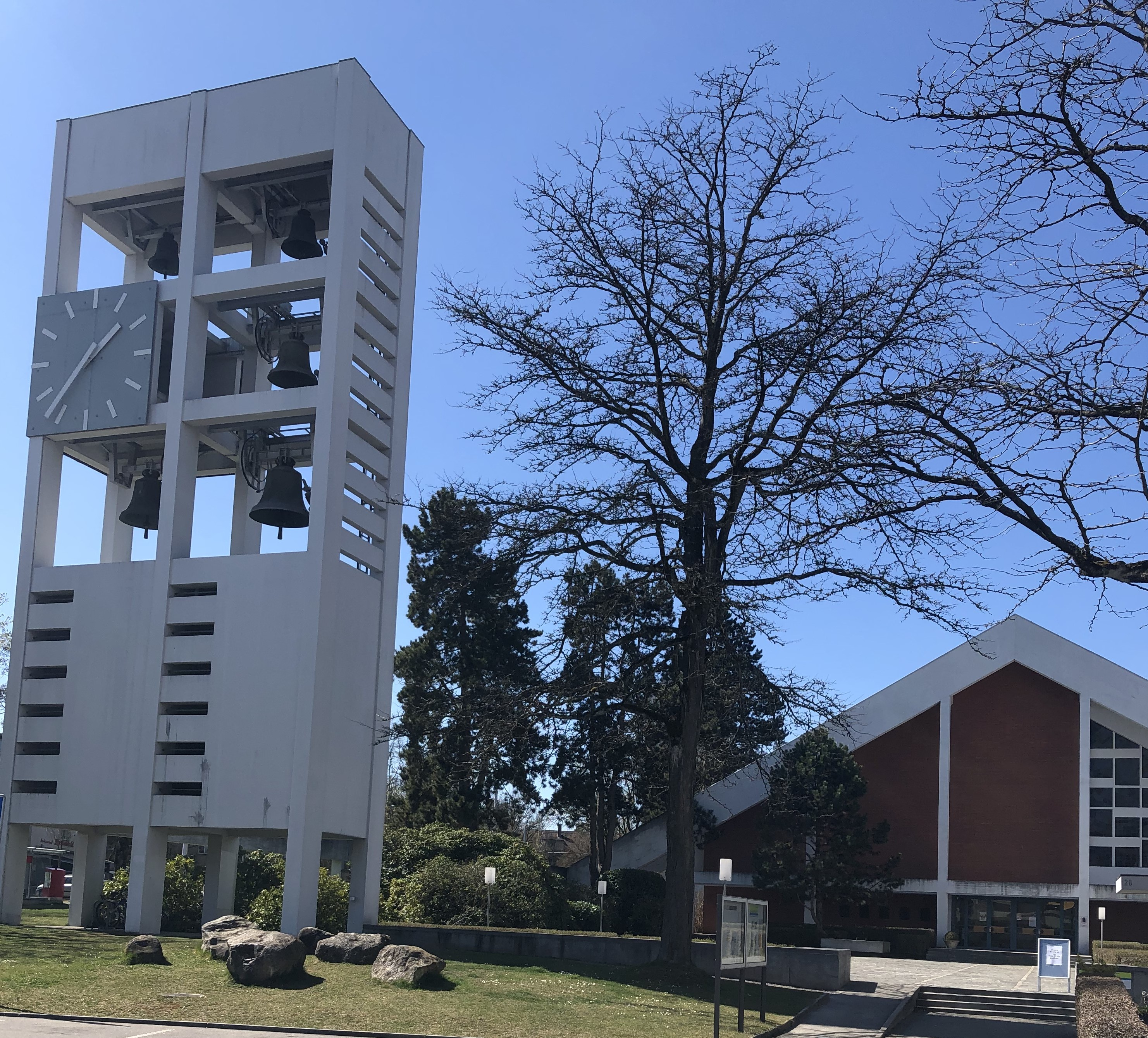 Bethlehemacker Kirche